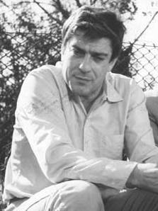 Escena en un exteriores donde aparecen sentados Enzo Viena, mirando hacia la izquierda, con los codos apoyados sobre las rodillas y las manos unidas. Viena viste camisa y pantalón.